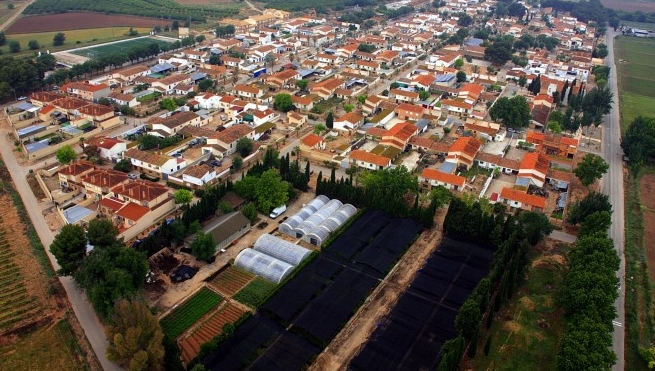 Estado actual del Pueblo (2015)